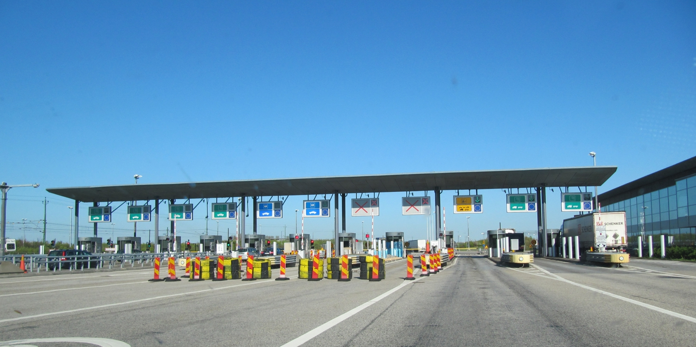 Öresundbrücke: Mautstation auf schwedischer Seite